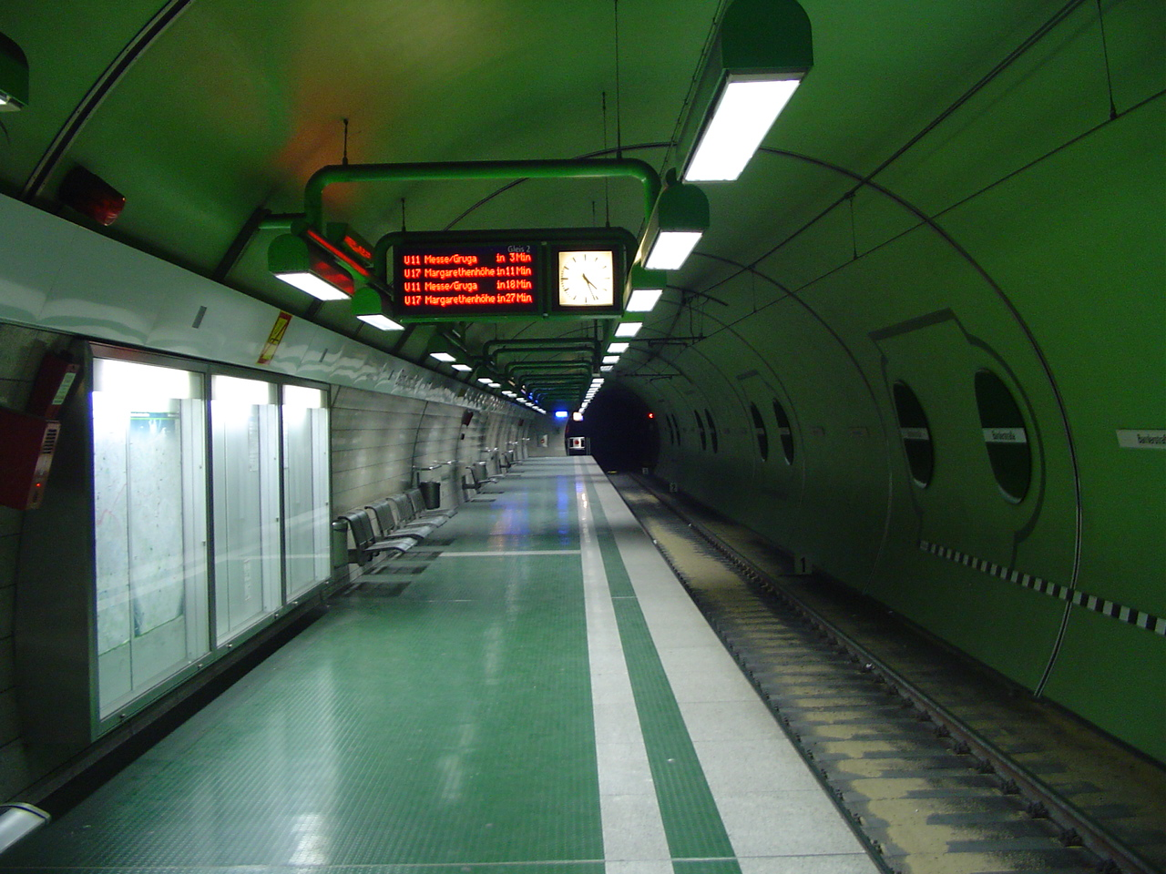 Essen Stadtbahn